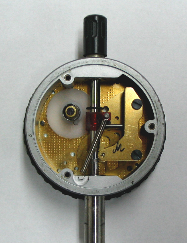 Inner view of Dial Gauge / Innenleben einer Messuhr